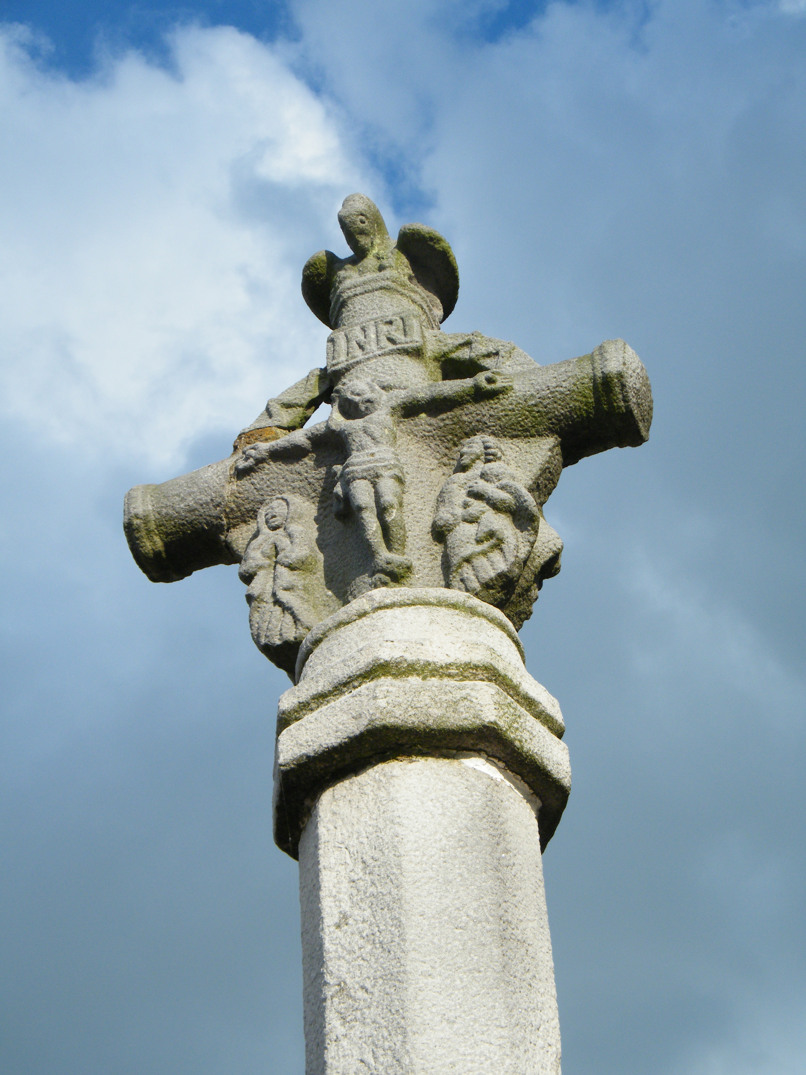 Sotteville-sur-Mer, Seine-Maritime, calvaire dans le cimetière, le pélican au sommet de la croix.